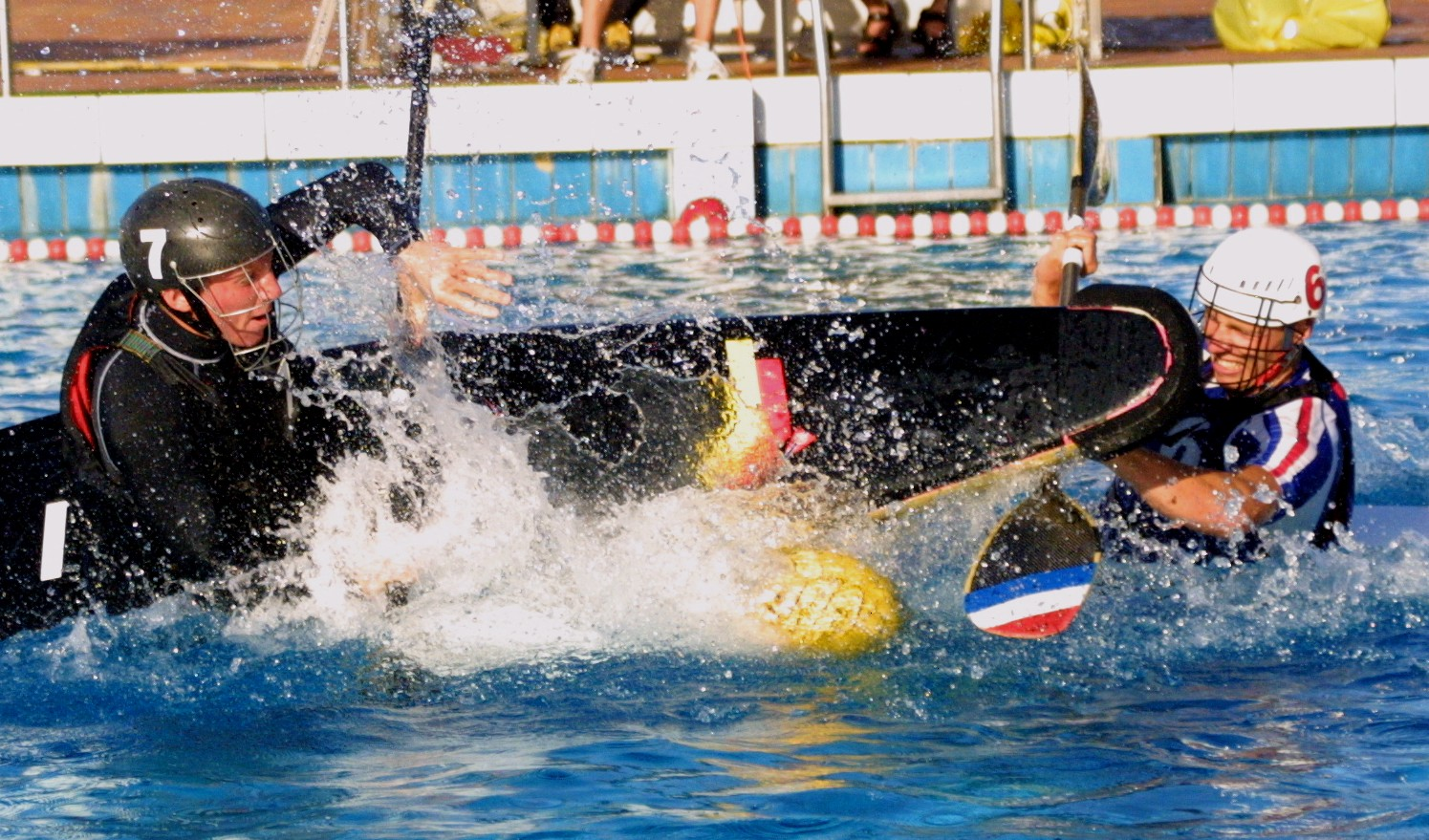 Kanupolo - Kampf um den Ball. Aufgenommen bei der Kanupolo WM 2002 in Essen. Autor: Matthias Godde (godde(at)versanet-online.de)